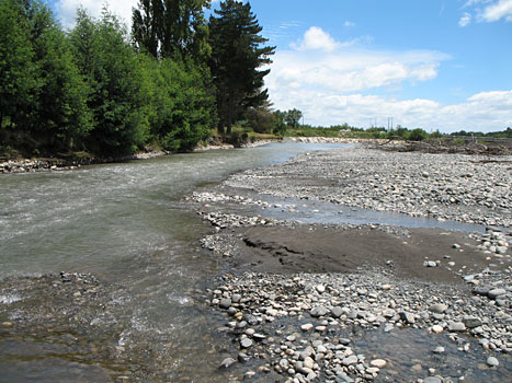 Rio Allipén, Chile